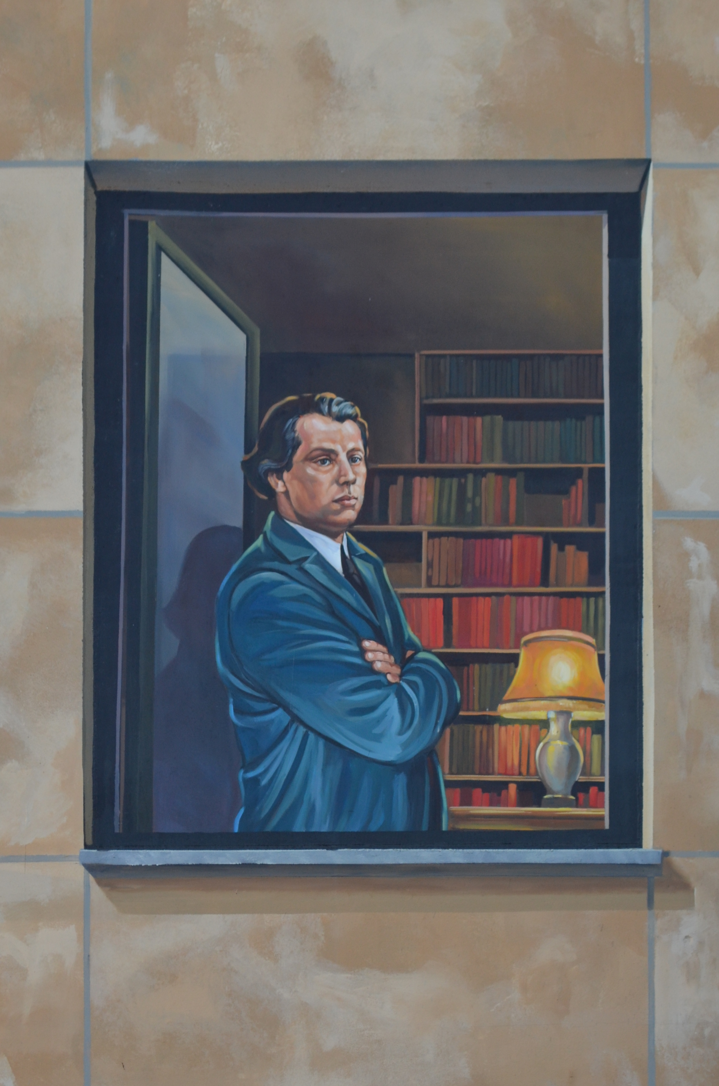 Namur (Belgique) - la fresque des Wallons après la restauration de 2018. François Bovesse.